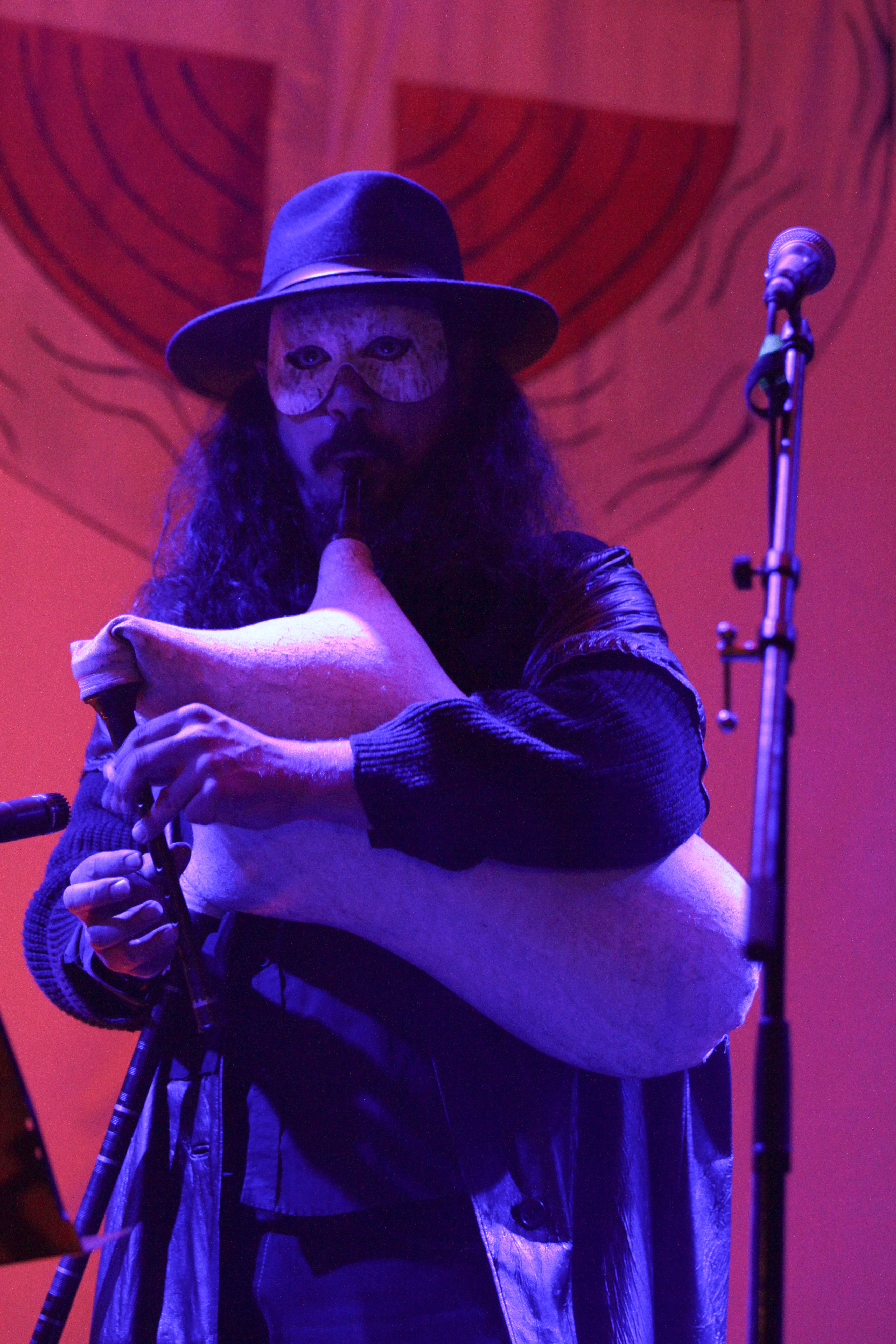 Daemonia Nymphe (Δαιμόνια Νύμφη) auf dem Wave-Gotik-Treffen 2013 in Leipzig, Heidnisches Dorf.